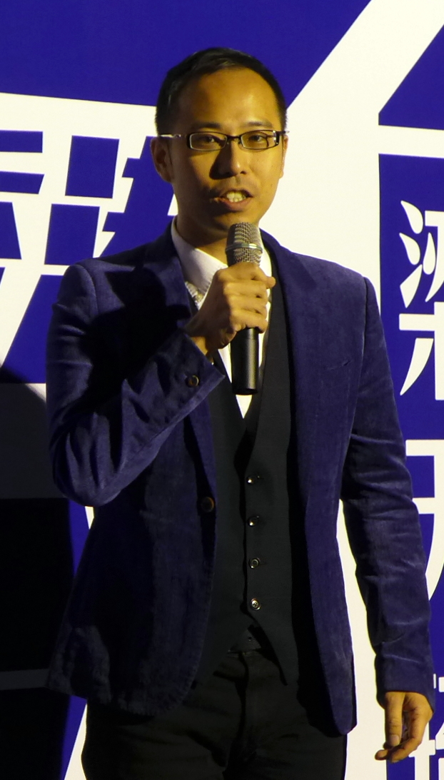 司徒夾帶 Sze-to sifu